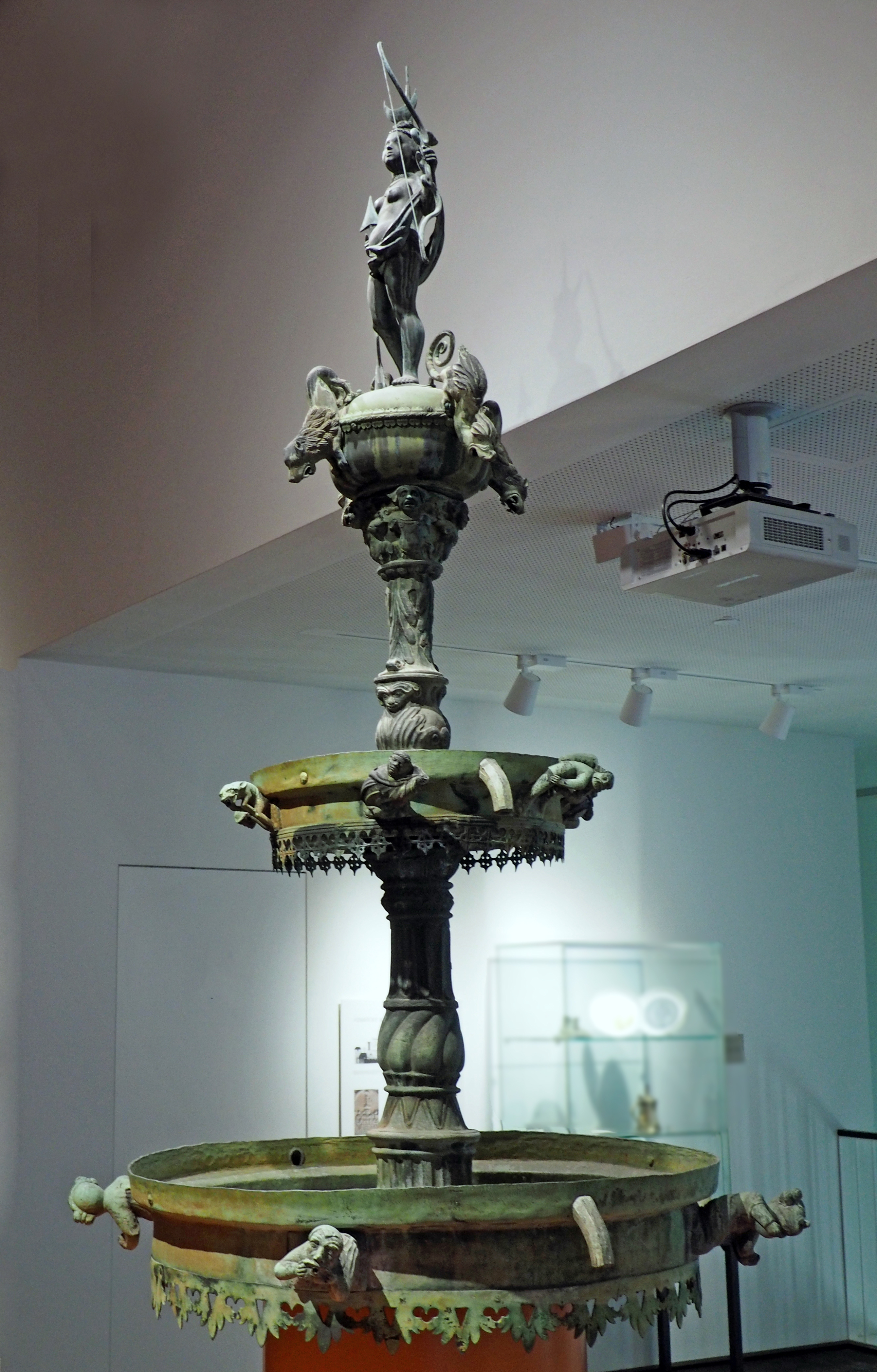 Luna-Brunnen (Marktbrunnen der Stadt Lüneburg) im Museum Lüneburg. Schalen von 1435, Säulen von 1540, Brunnenfigur-Replik etwa 1970